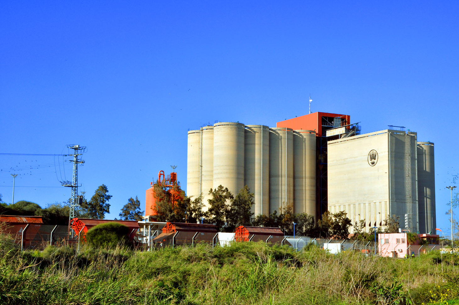 Tanks in Ashdod